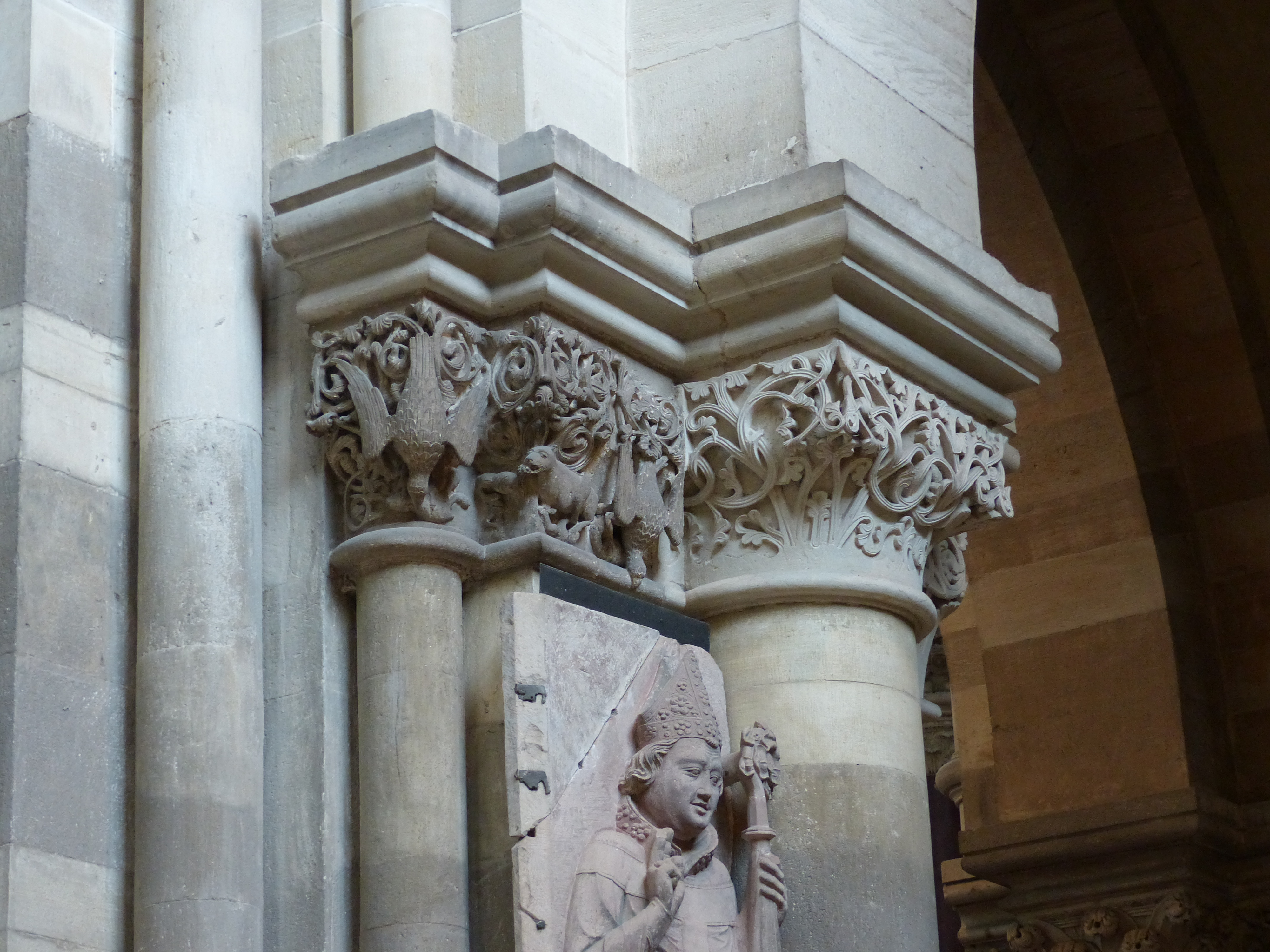 Magdeburger Dom: Kapitell an der Außenseite des Abgangs des Chorumgangs aus dem nördlichen Querhaus